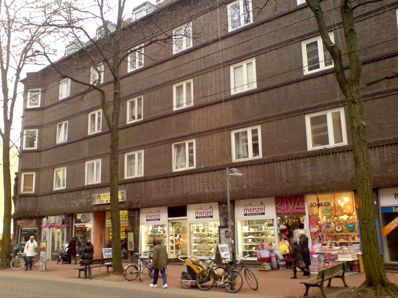 In der Limmerstraße 3 arbeitete Norbert Kronenberg als Techniker bei Radio Menzel.